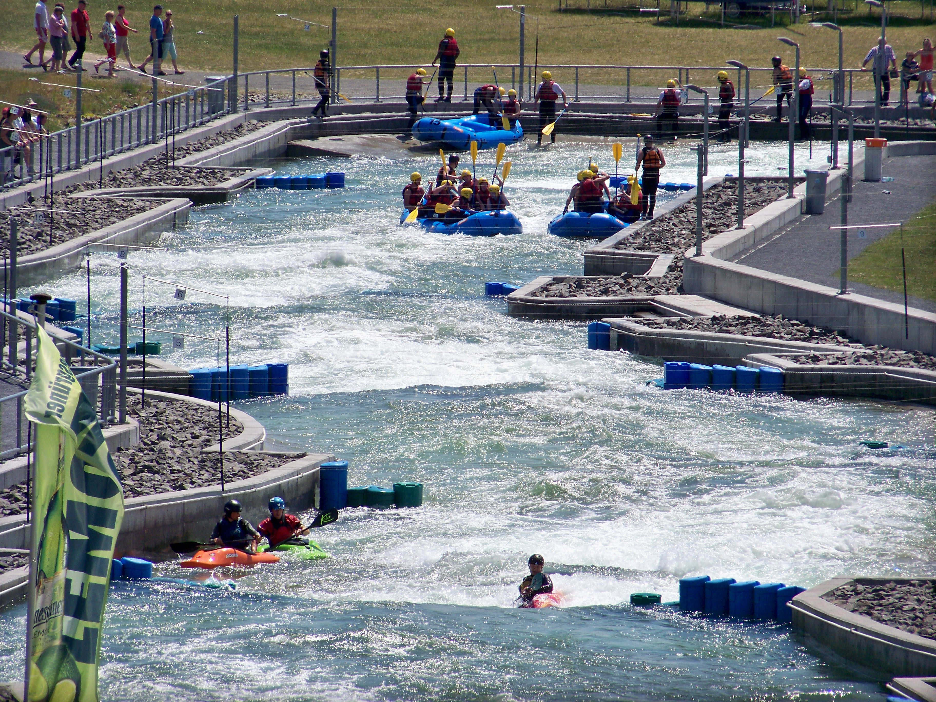 Wildwasseranlage am Markkleeberger See